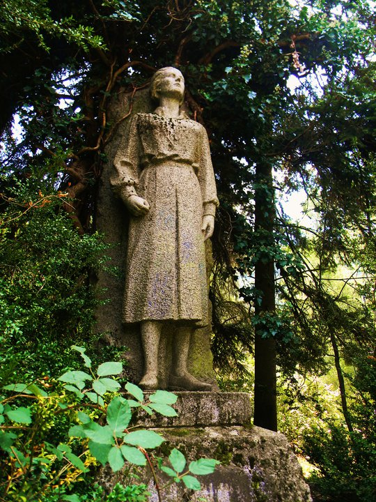 Паметникът на Йорданка Чанкова в село Елешница